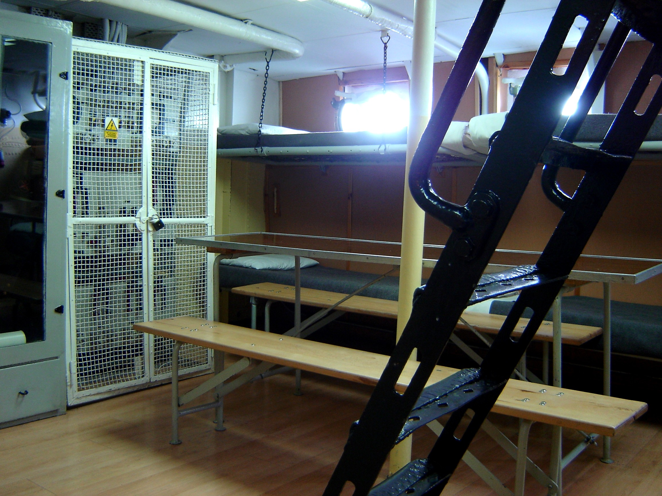 ORP Błyskawica. Kubryk (forecastle).